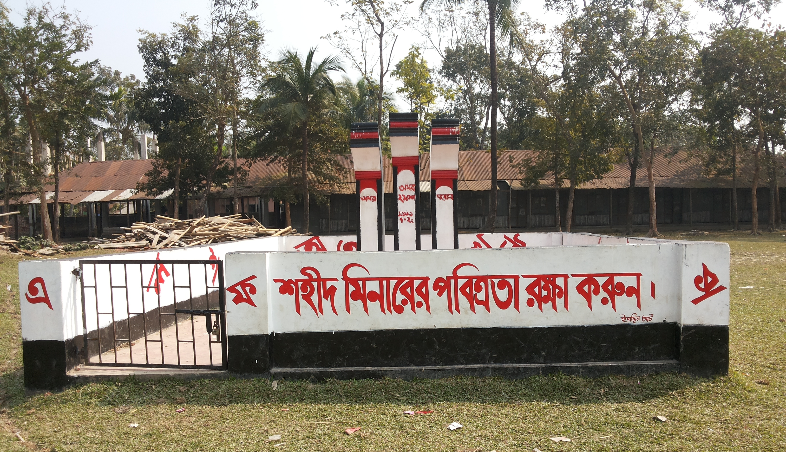 গুণবতী ডিগ্রী কলেজের শহীদ মিনার